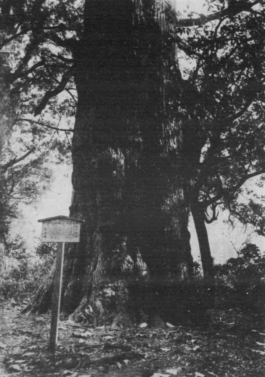 熊本県阿蘇市にある手野の大杉。西側から撮ったもの。